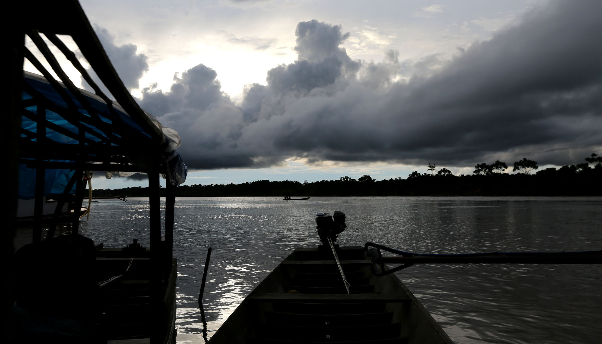 Foto: Sérgio Vale/Secom